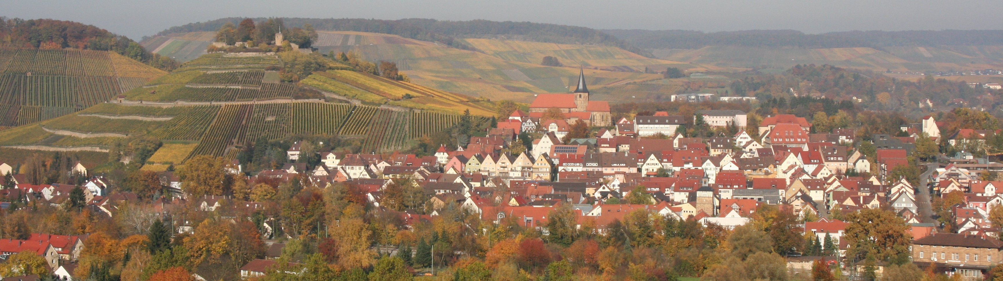 Weinsberger Kernstadt von Süden von erhöhtem Standpunkt